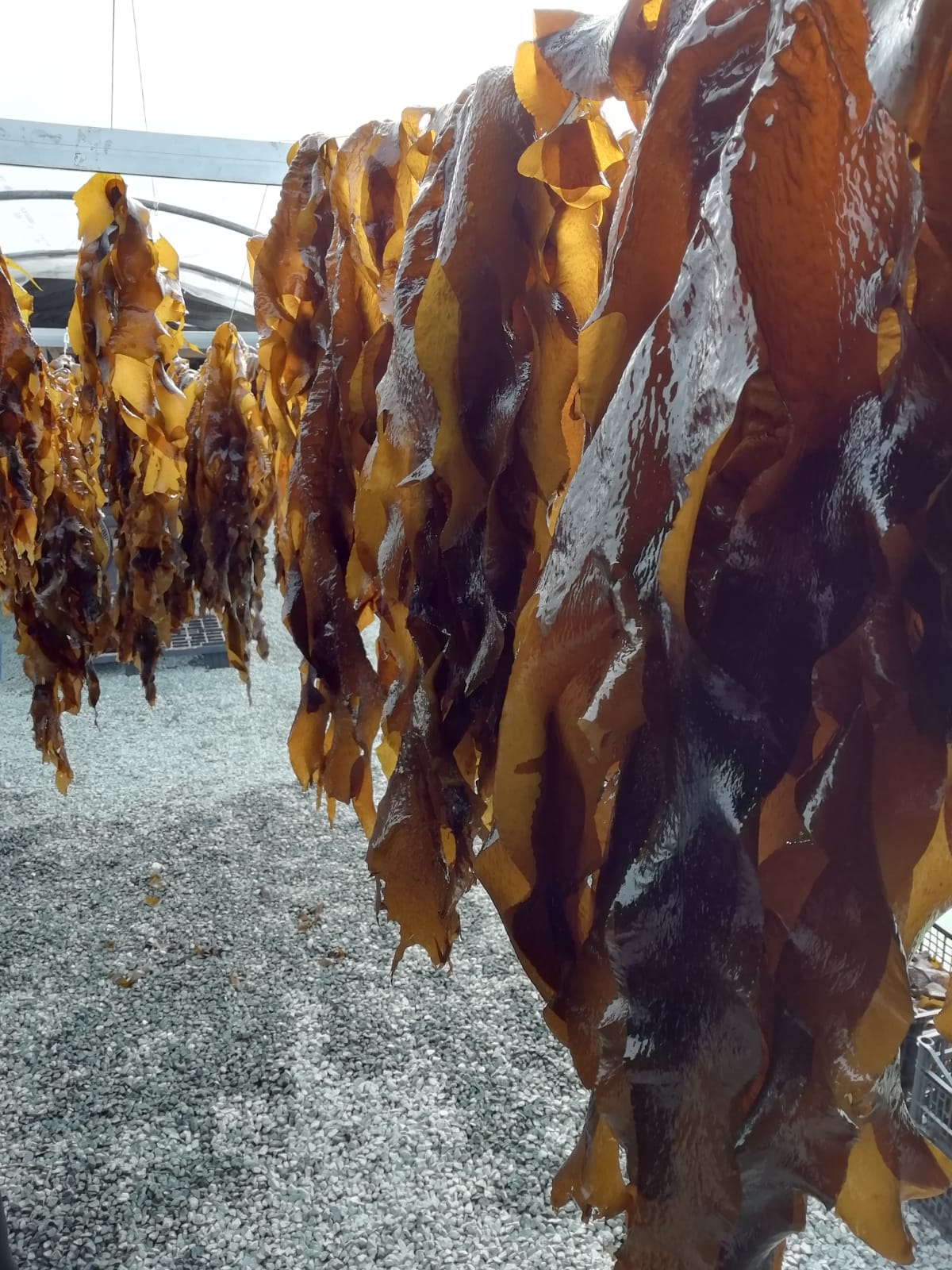 Séchage du WAKAME - Algues de l'Île de Ré